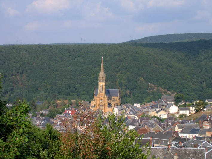 le centre ancien de Fumay, enserré dans une boucle de la Meuse.